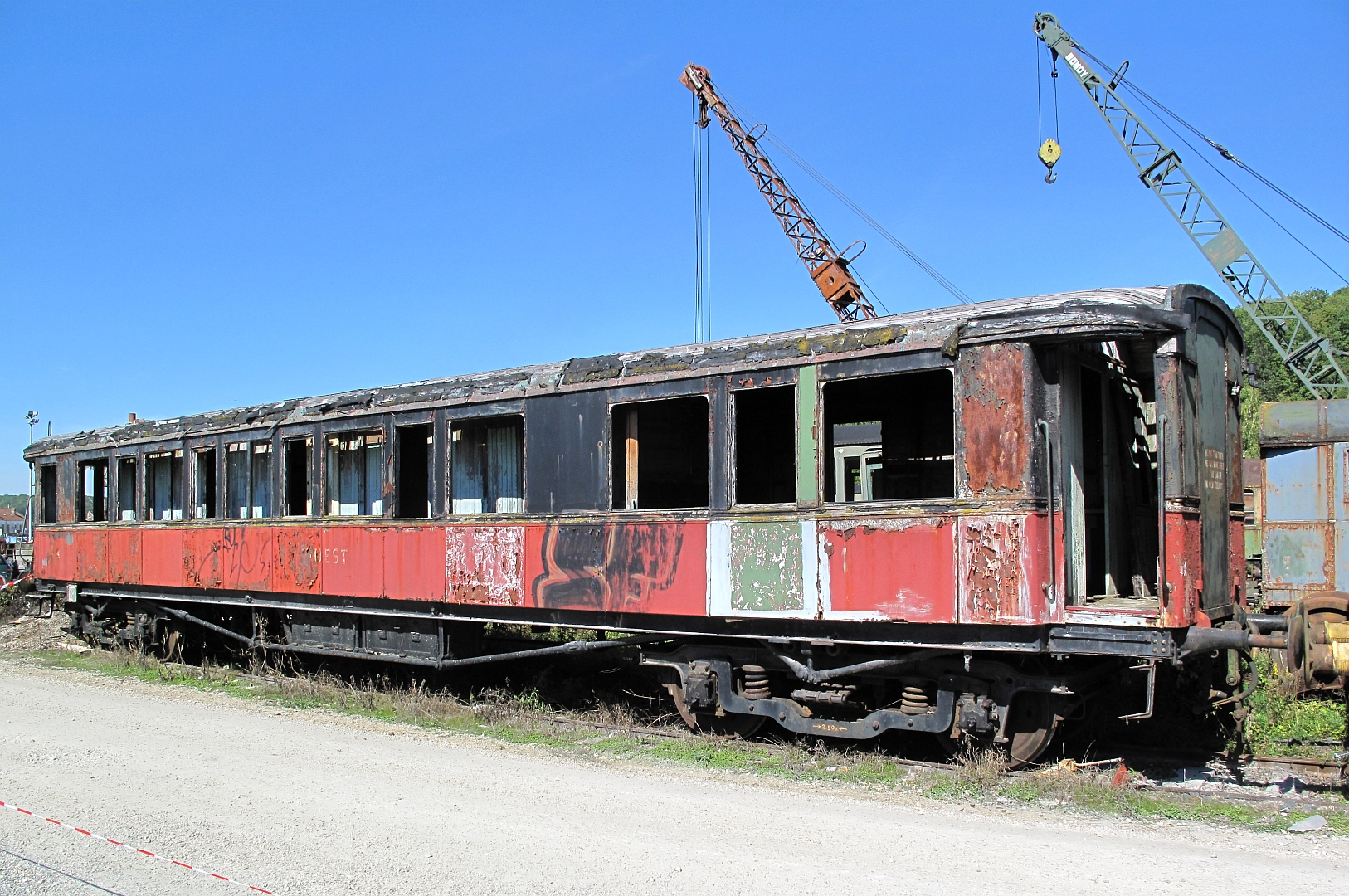 La voiture A7 yfi 5 Ouest en attente de restauration à Longueville le 19 septembre 2010.